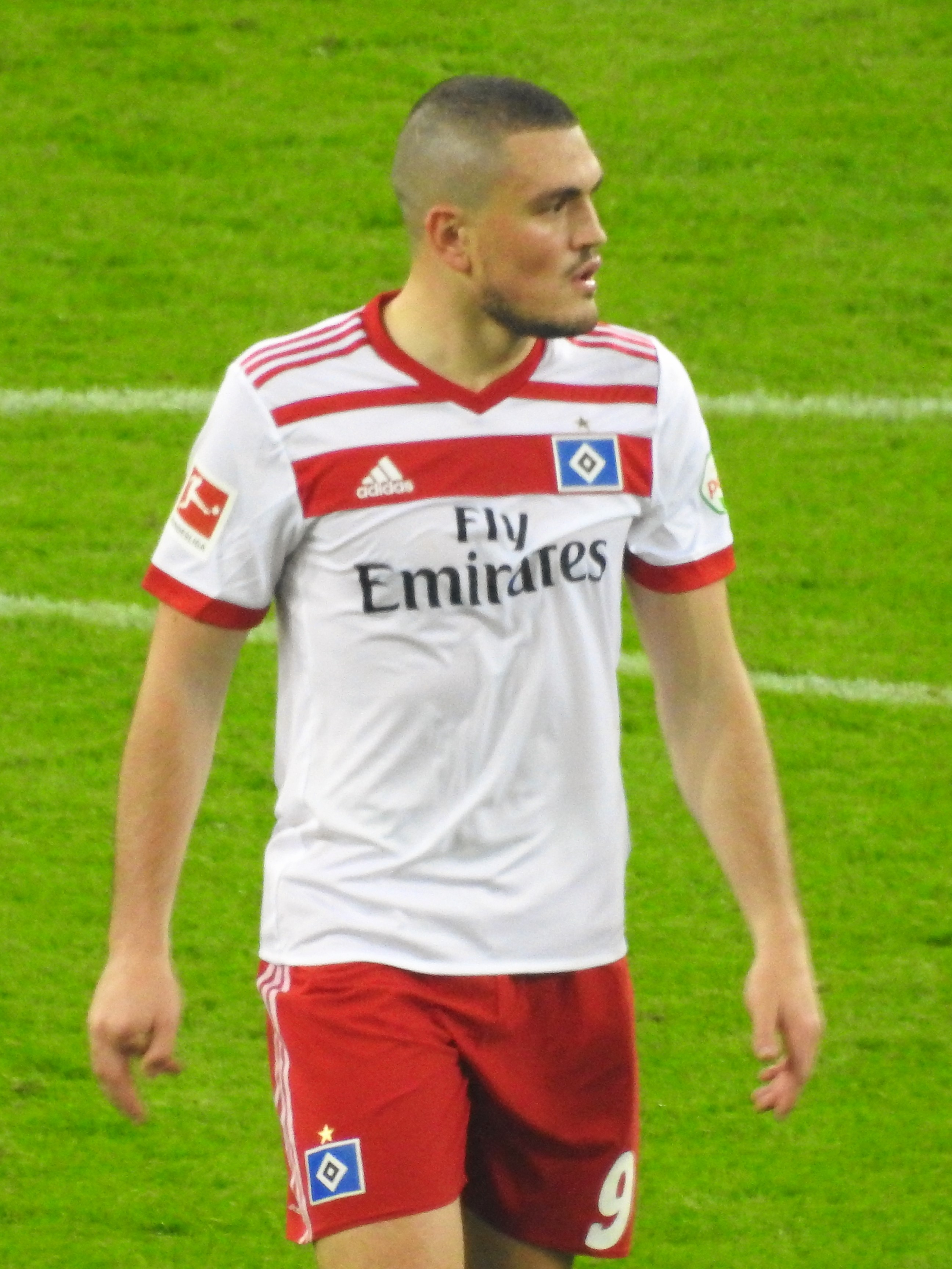 Papadopoulos, Kyriakos HSV 17-18